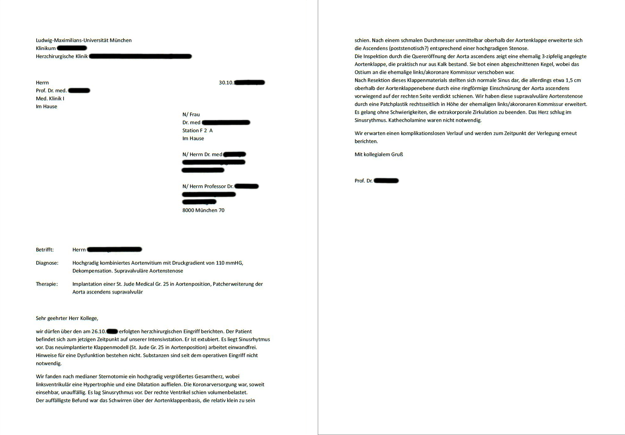 Abschrift eines Arztbriefes zu einem herzchirurgischen Eingriff.